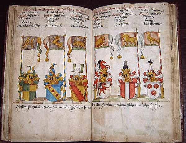 Darstellung der Turniergesellschaften im Turnierbuch der Familie von Gemmingen-Hornberg. Archiv Burg Hornberg